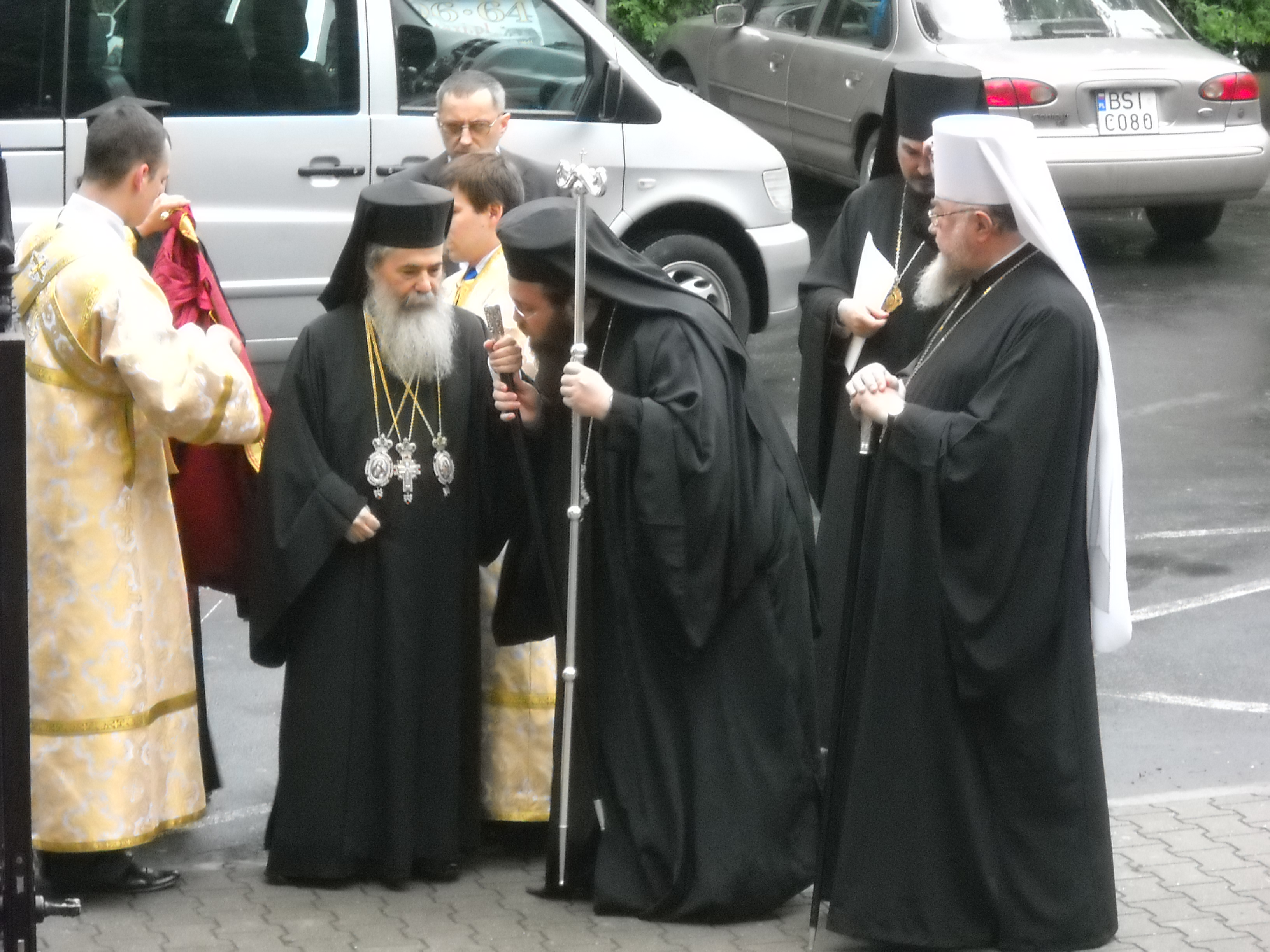 Patriarcha jerozolimski Teofil w Polsce, Warszawa 24 czerwca 2010